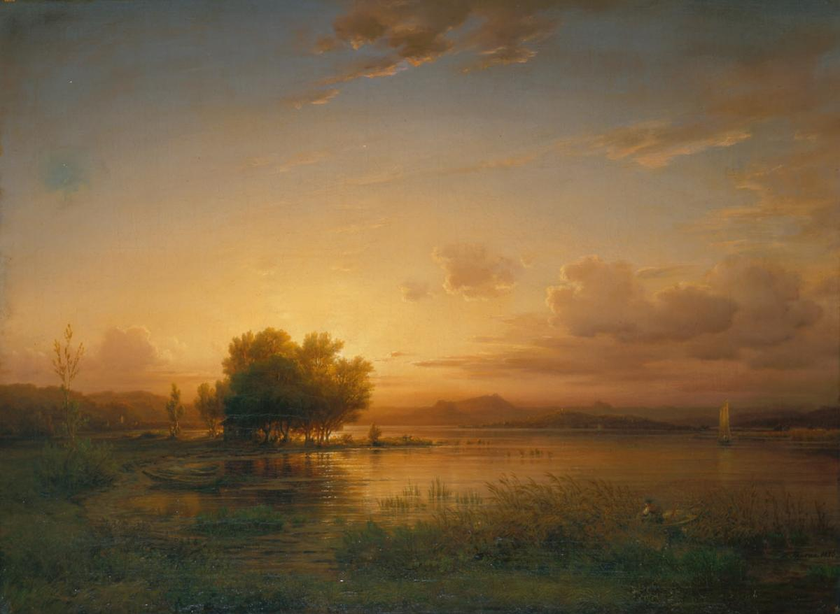 Abendliche Bodenseelandschaft